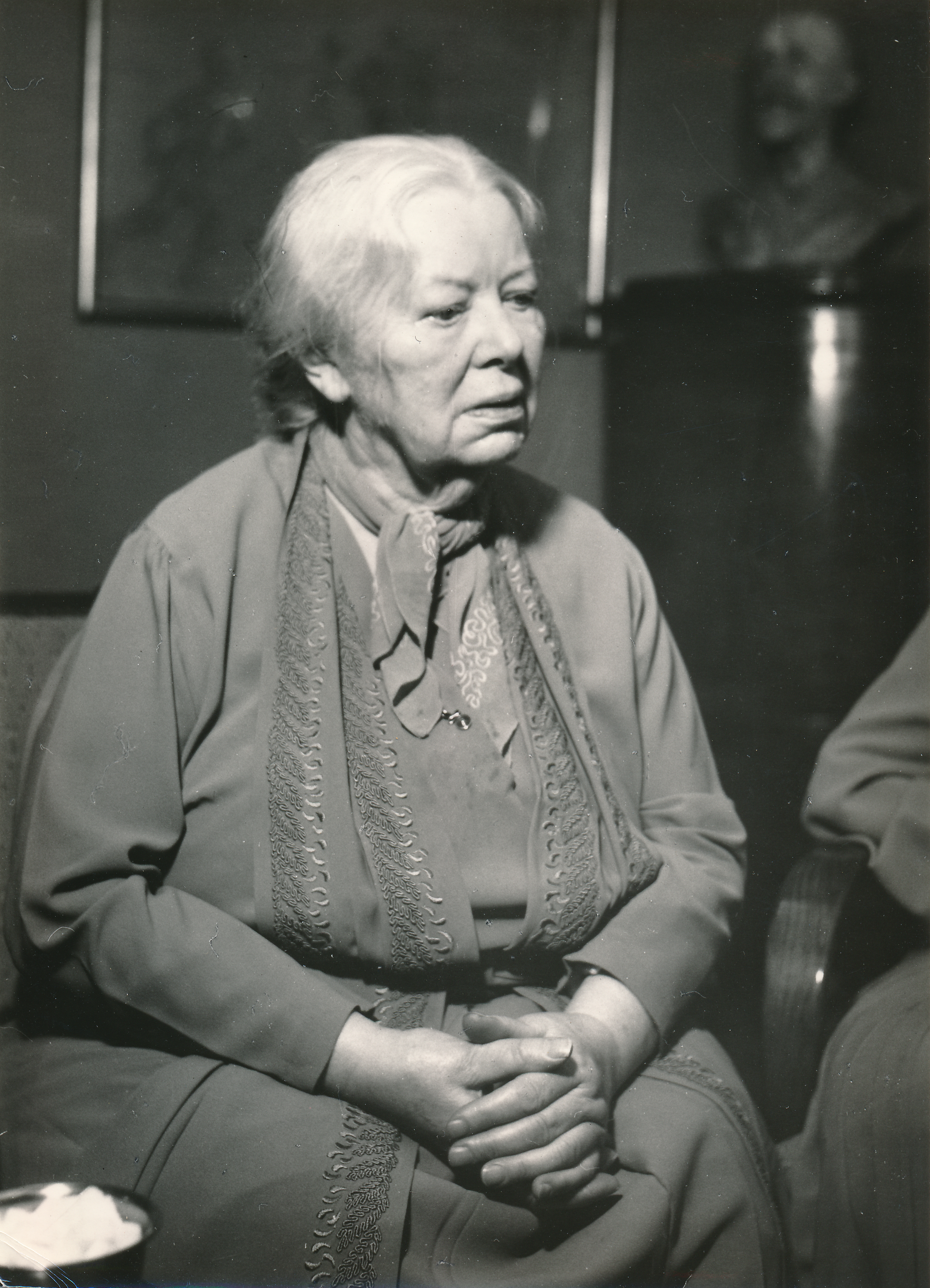 Helga Ancher (1960’erne)